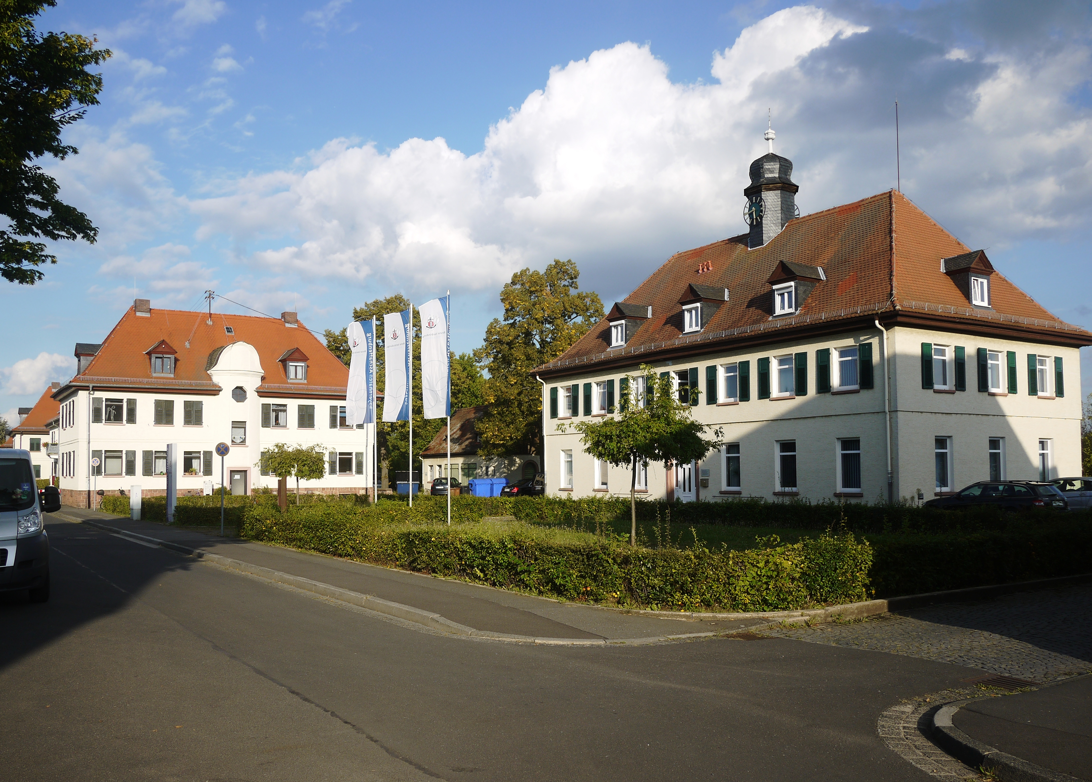 Hafenbahnhofstraße 23 und 25, Teil einer denkmalgeschützten Gebäudegruppe mit insgesamt 7 Häusern im Aschaffenburger Stadtteil Leider